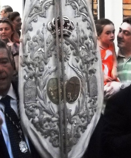 Escudo que aparece en el bacalao de la hermandad